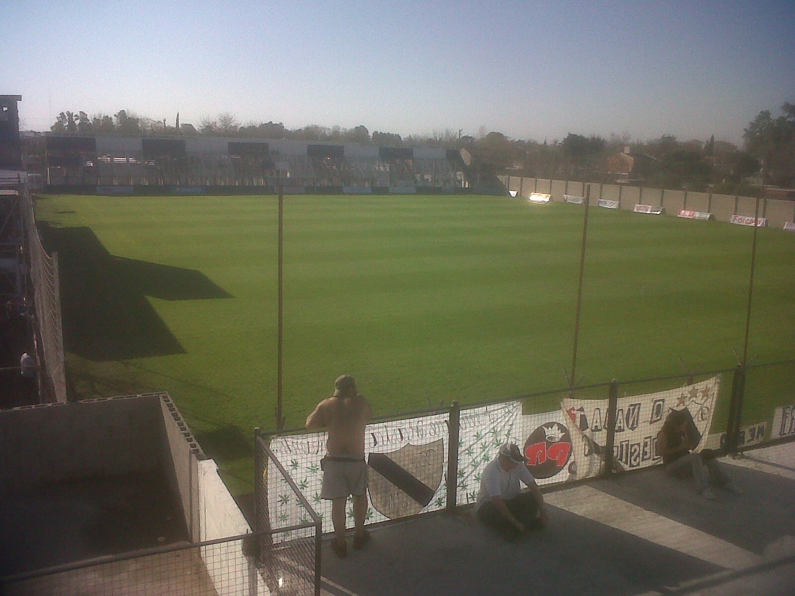 estadio jose manuel moreno